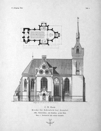 Bauzeichnung der Gutskirche Schönfeld (Altmark), Nordansicht